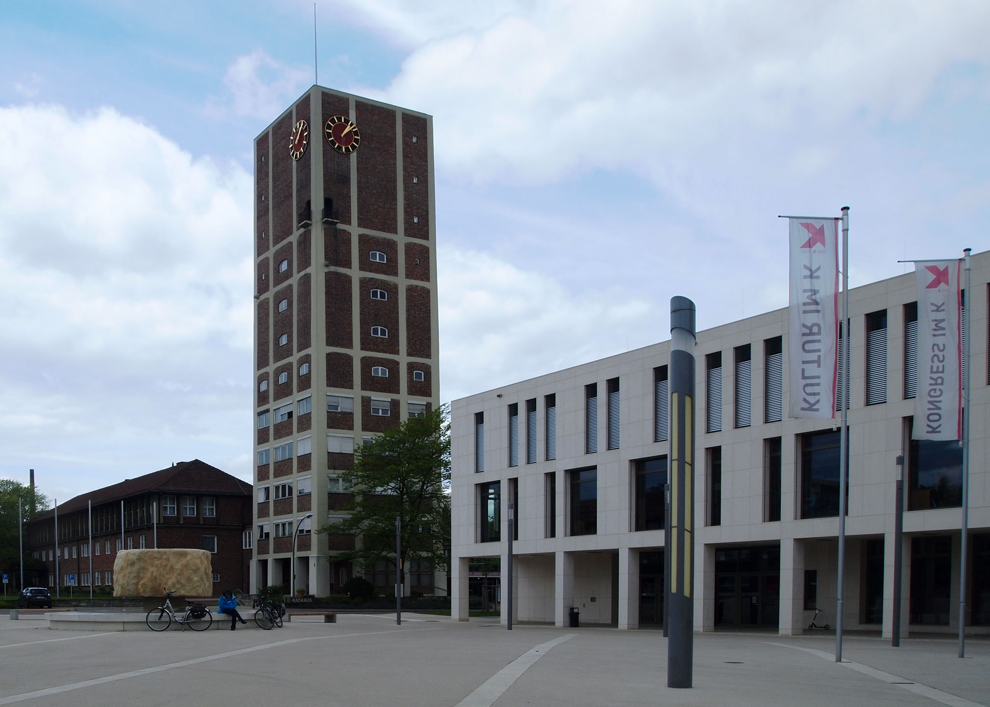 Rathaus Kornwestheim und Kongresszentrum das K